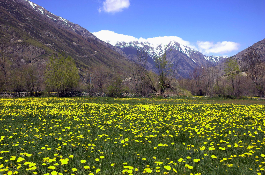 Camp de flors de Llívia